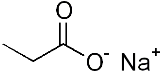 chemical structure of sodium propanoate (sodium propionate)